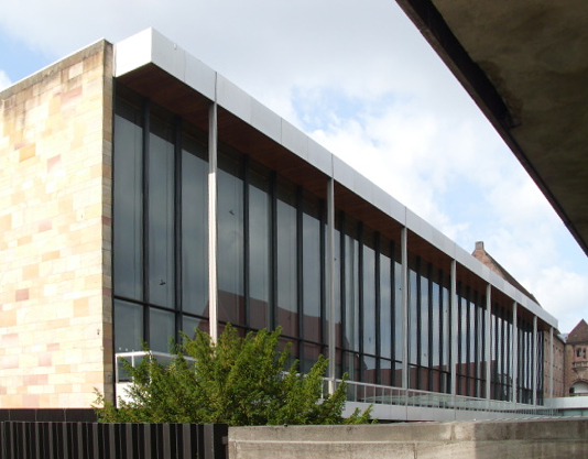 Ausstellungsraum 9 Meter hohe durchgehende Glasscheiben